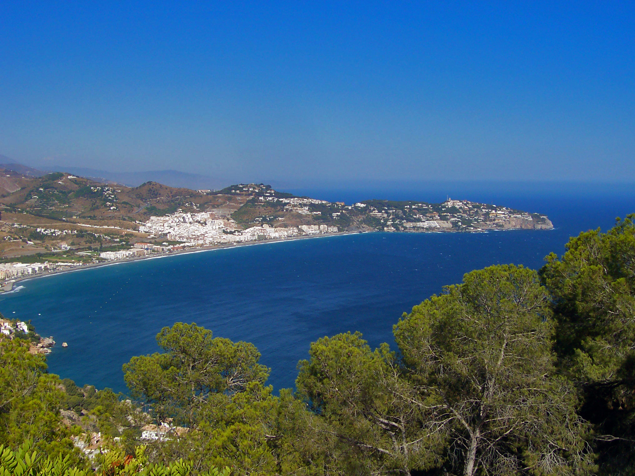 Imagen de la Bahía de La Herradura (Granada-España) tomada desde Cerro Gordo